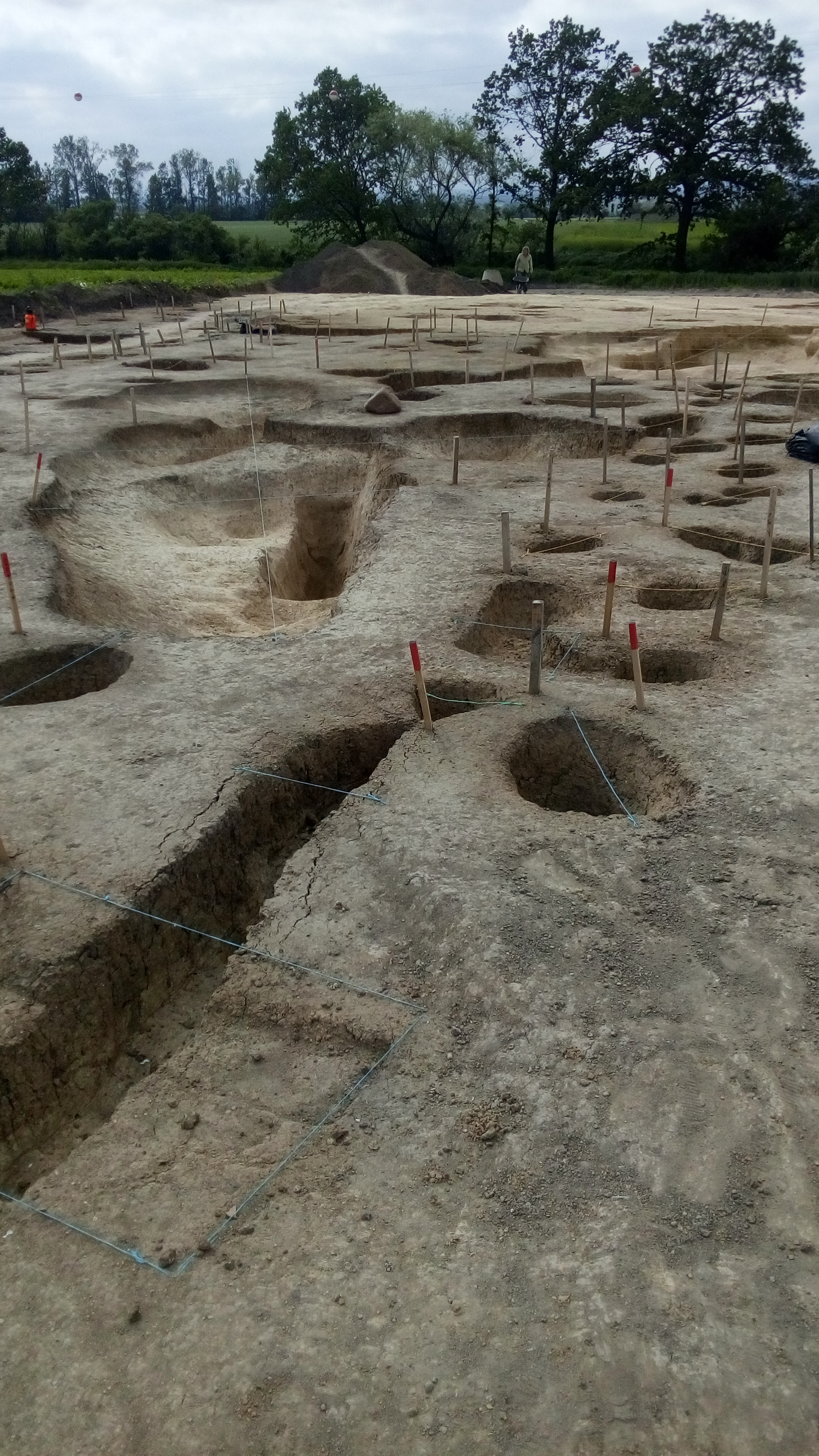 Celkový pohled na probíhající archeologický výzkum.